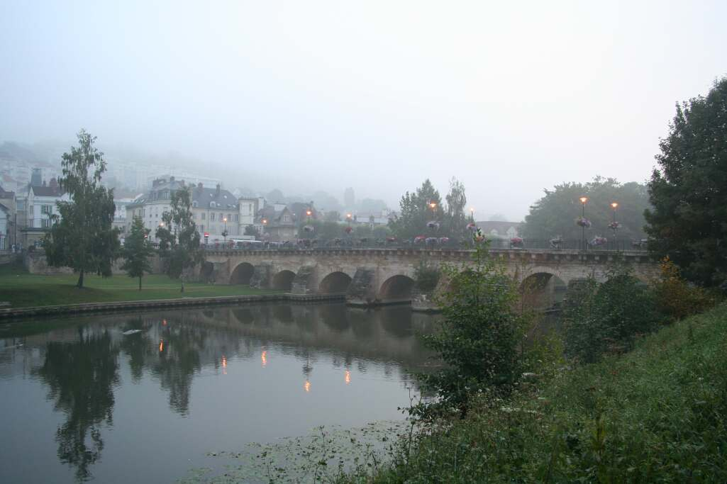 Pont aux Perches à Meulan - Yvelines (France)